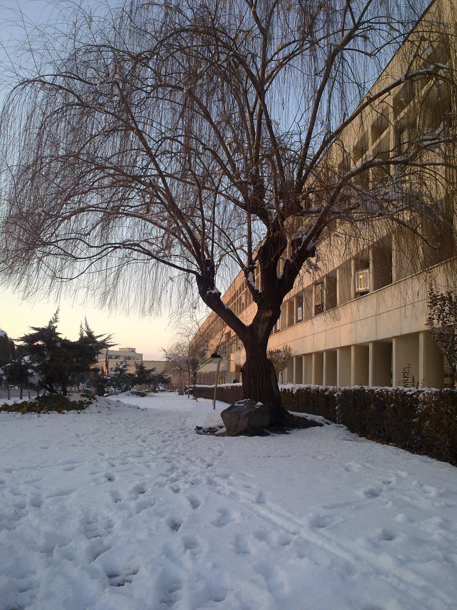 ساختمان مرکزی دانشگاه خوارزمی کرج در زمستان